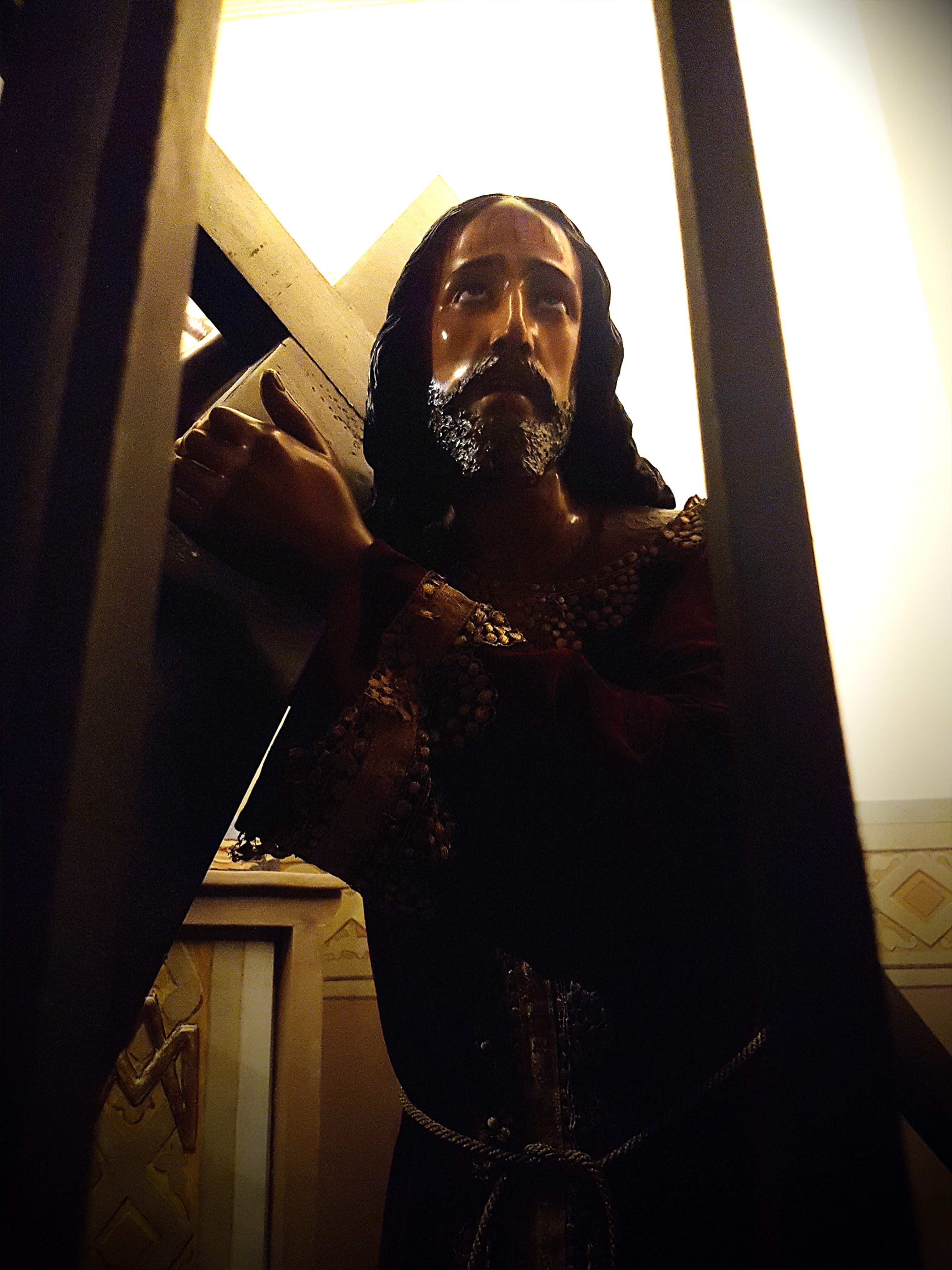 Jesus carregando Cruz na parte interna da Paróquia.